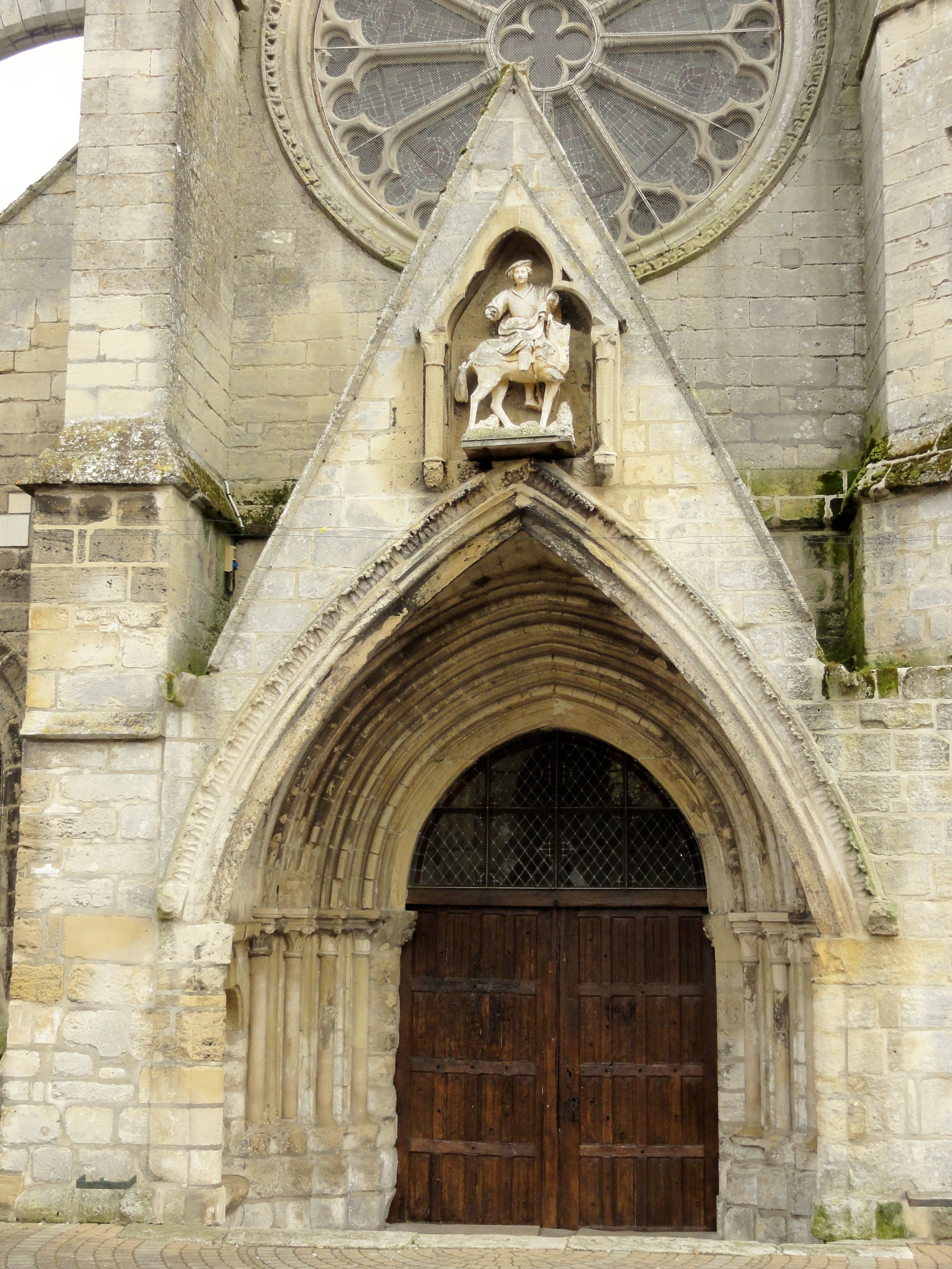 Portail occidental.